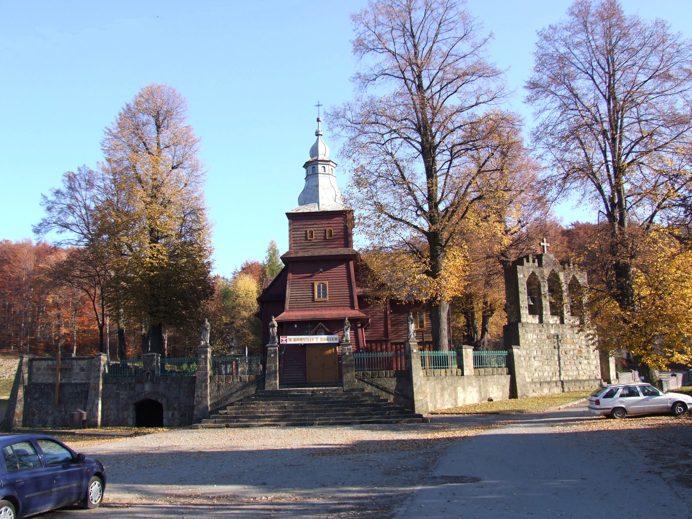 Trzemeśnia - kościół parafialny p.w. św. Klemensa, otoczenie, drzewostan